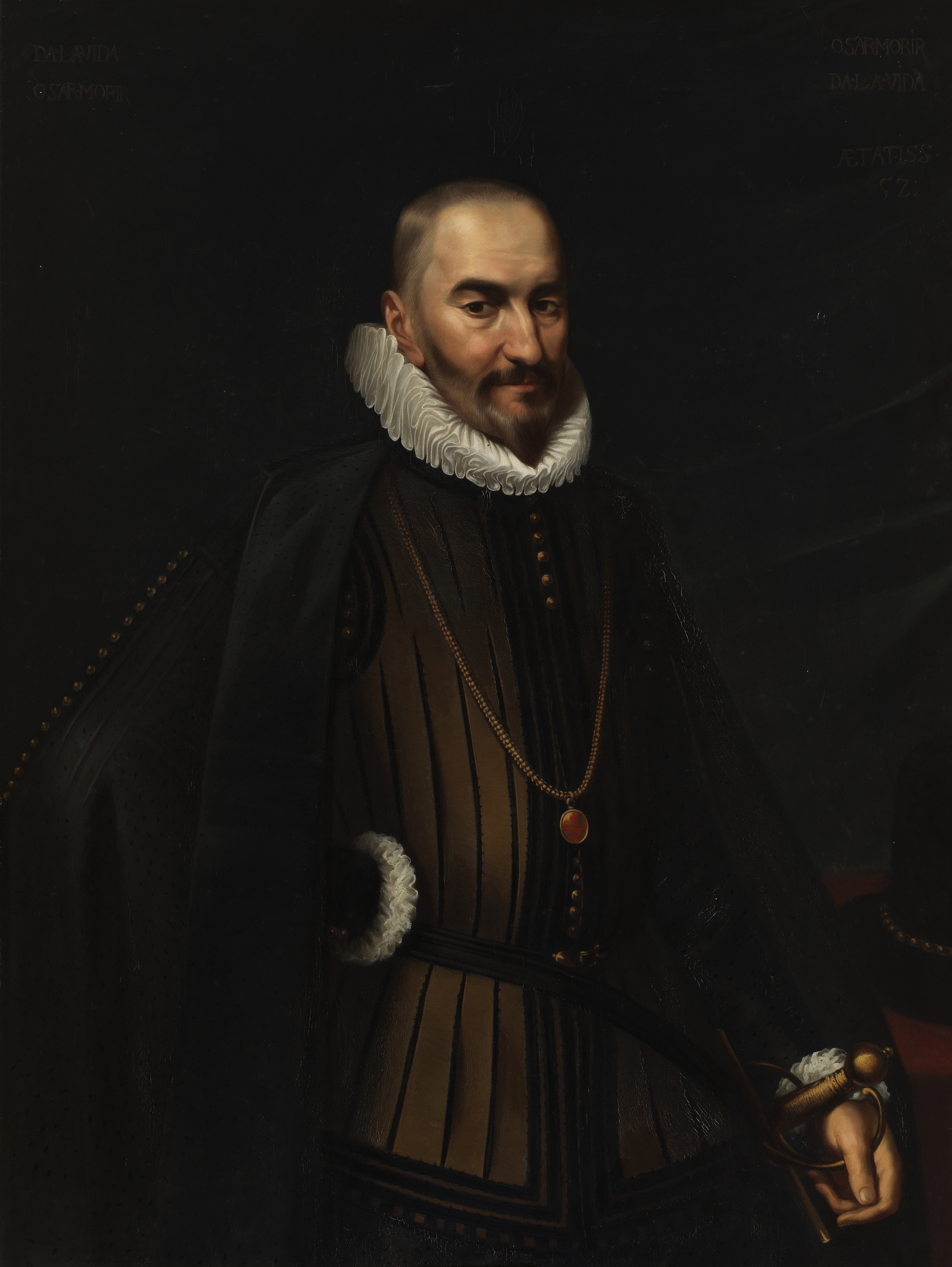 Retrato del aristócrata y diplomático español Diego Sarmiento de Acuña (1567-1626), que fue el primer conde de Gondomar por concesión del rey Felipe III de España y embajador de España en Inglaterra entre 1613 y 1622, así como caballero de la Orden de Calatrava.